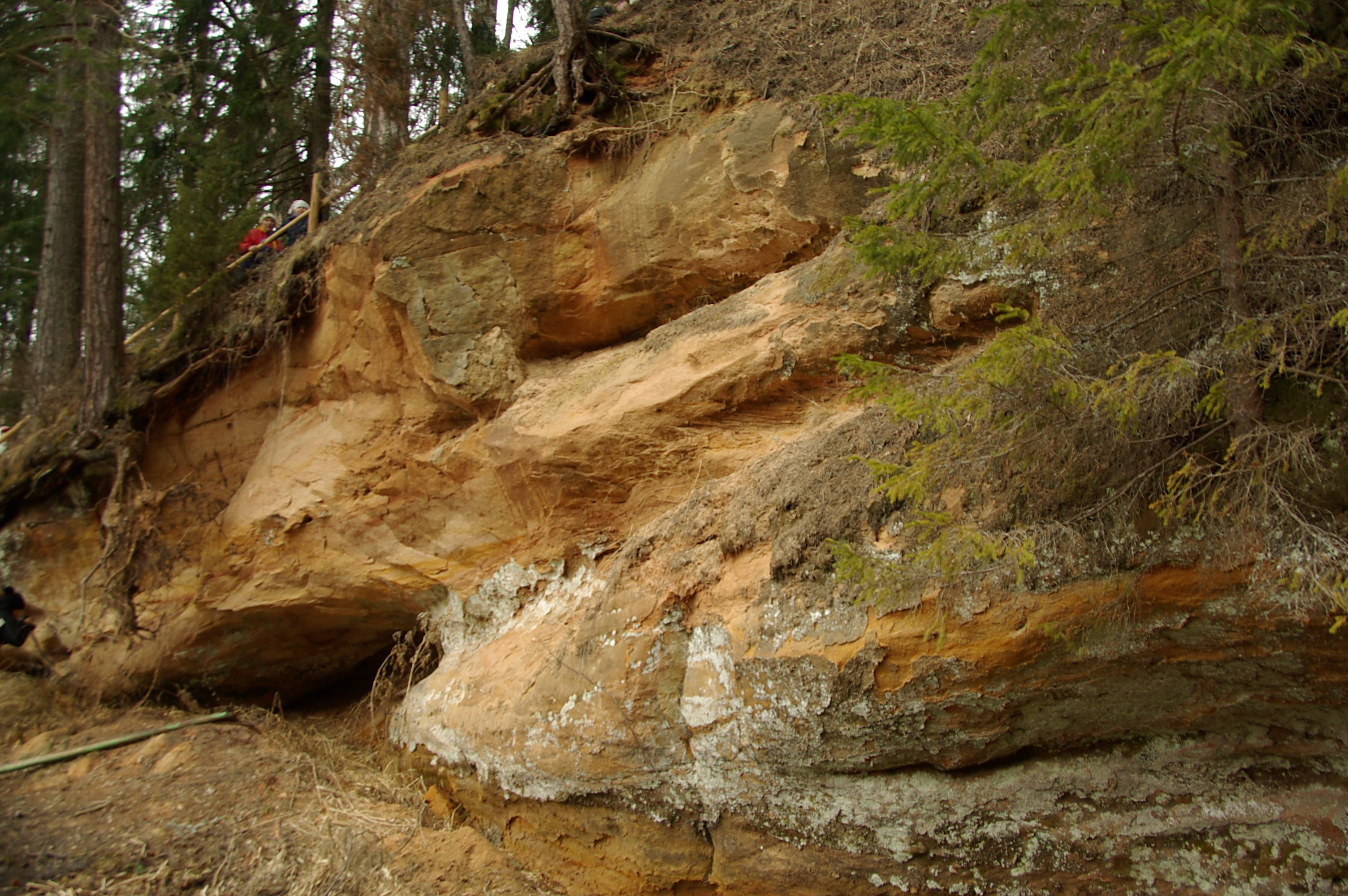 Võhandu jõe ürgorg asub Põlva maakonnas Veriora vallas.